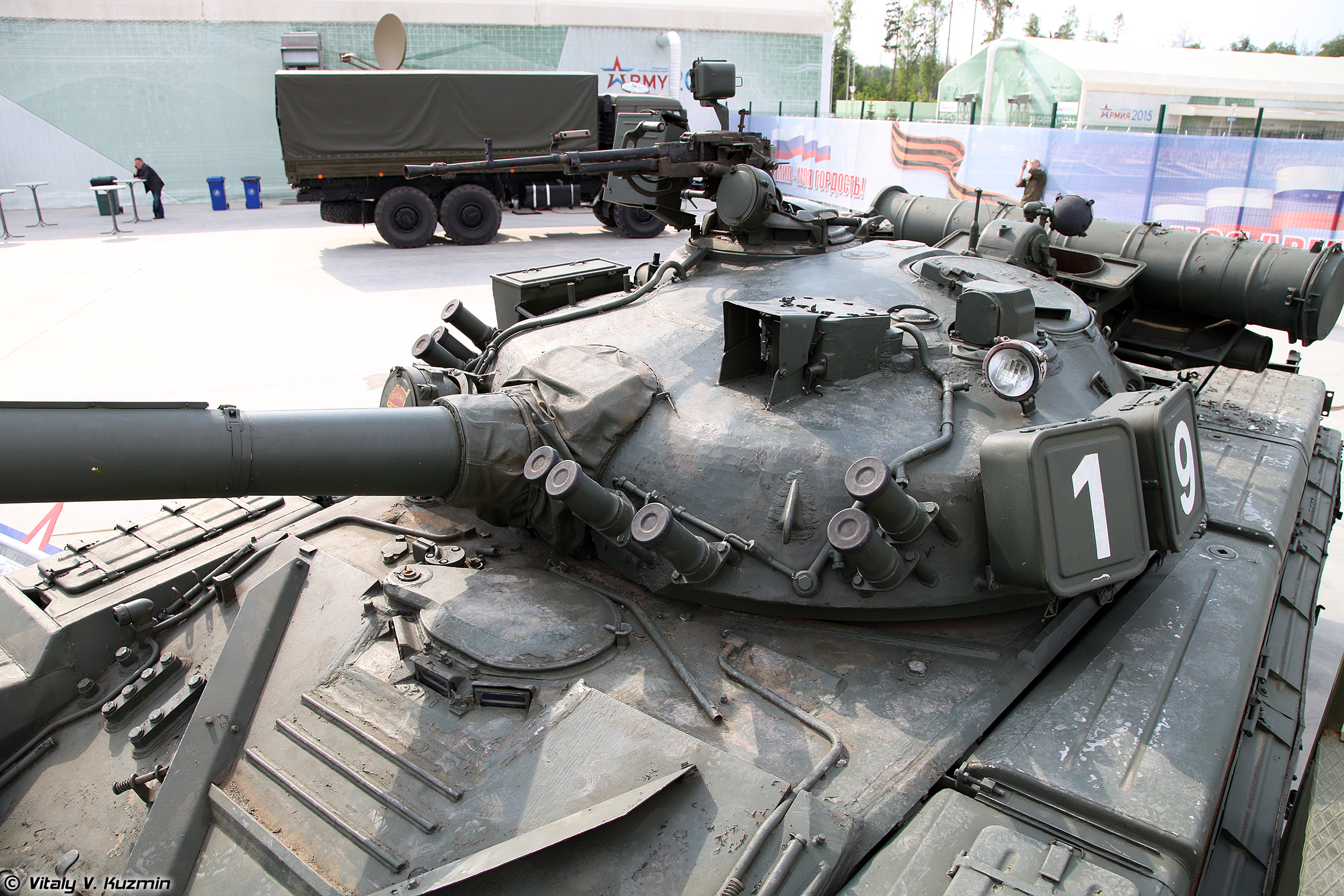 Объект 219Р Т-80Б (Object 219R T-80B)